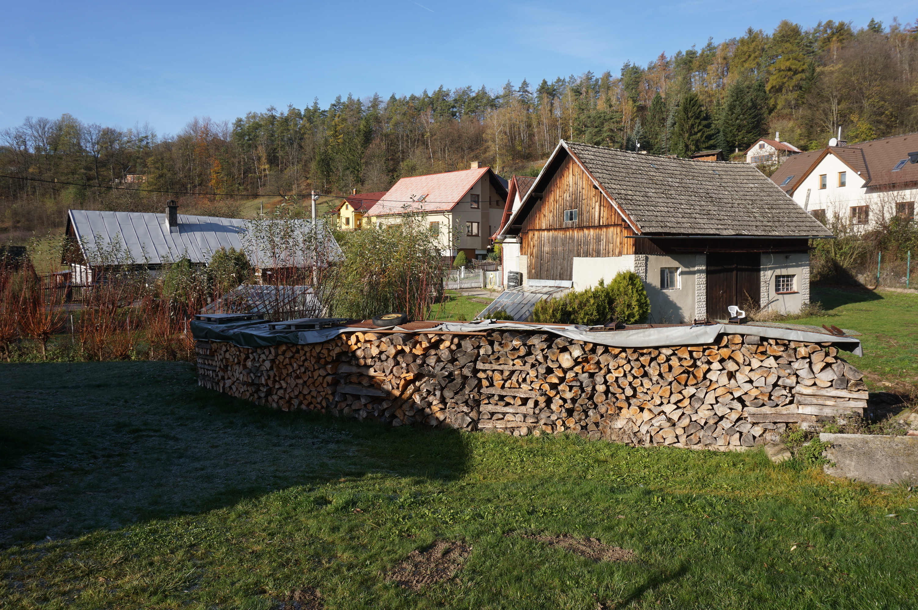 Vesec (pod Kozákovem) - okolí čp. 33 od autobusové zastávky